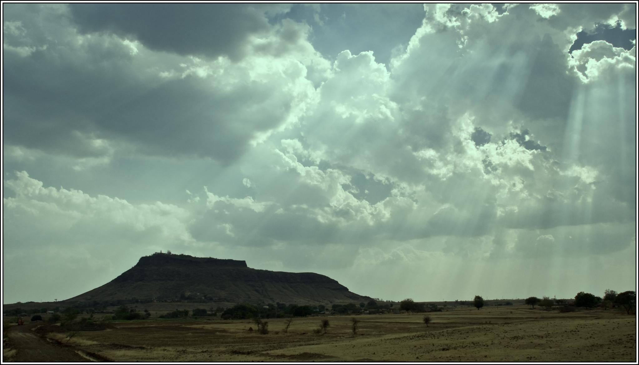 Fort Bhushangad, Maharashtra, India.